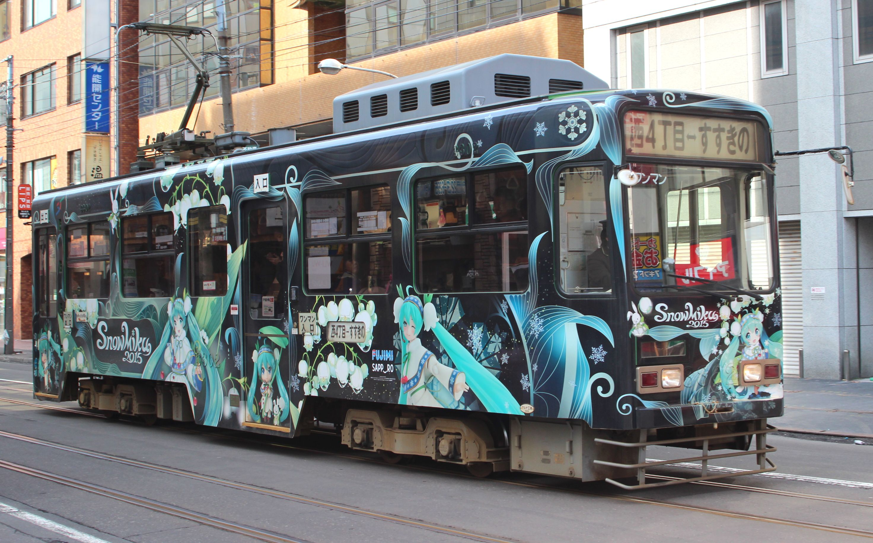 札幌市交通局3300形電車 「雪ミク」ラッピング